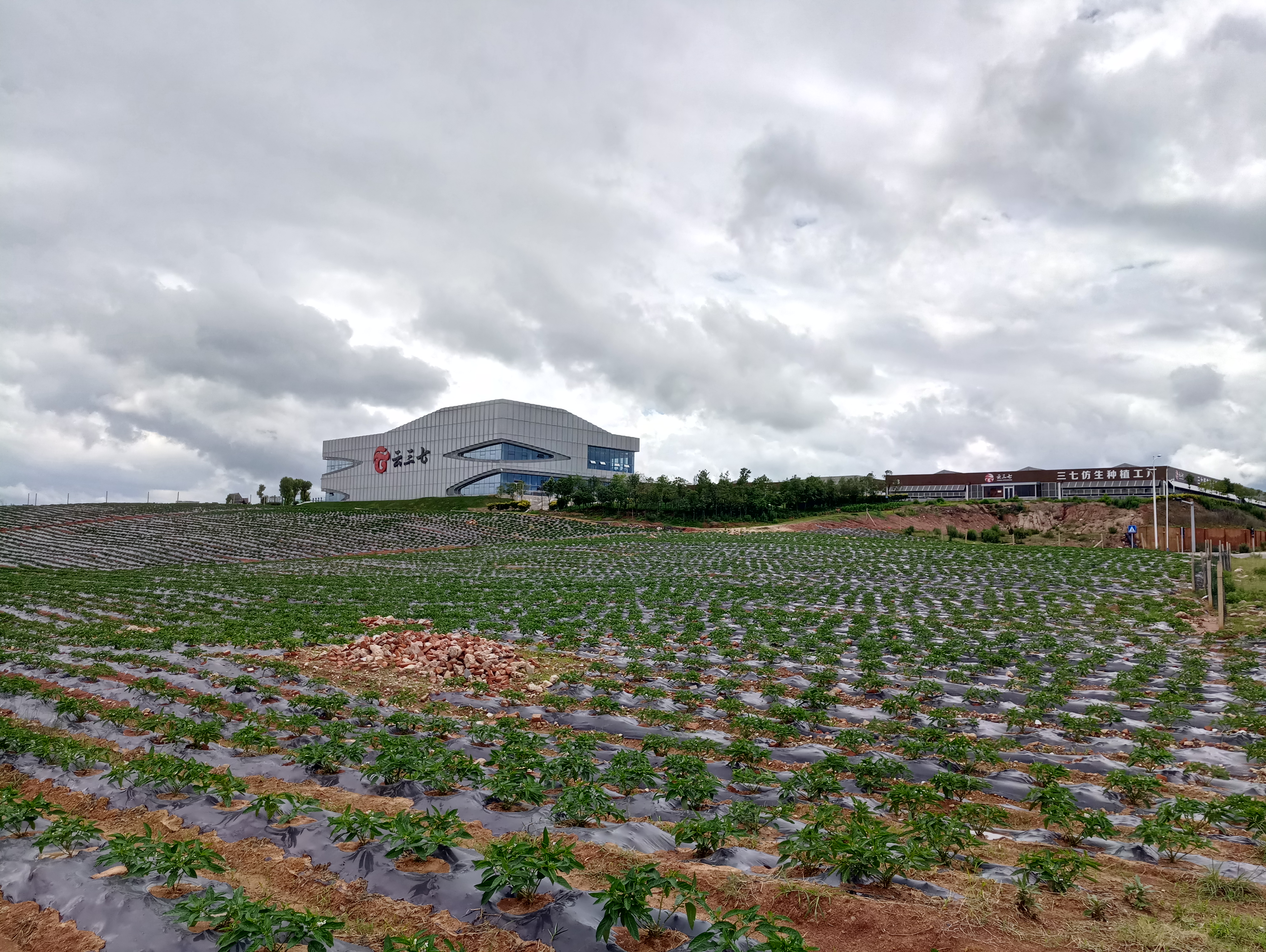 云三七石林工厂